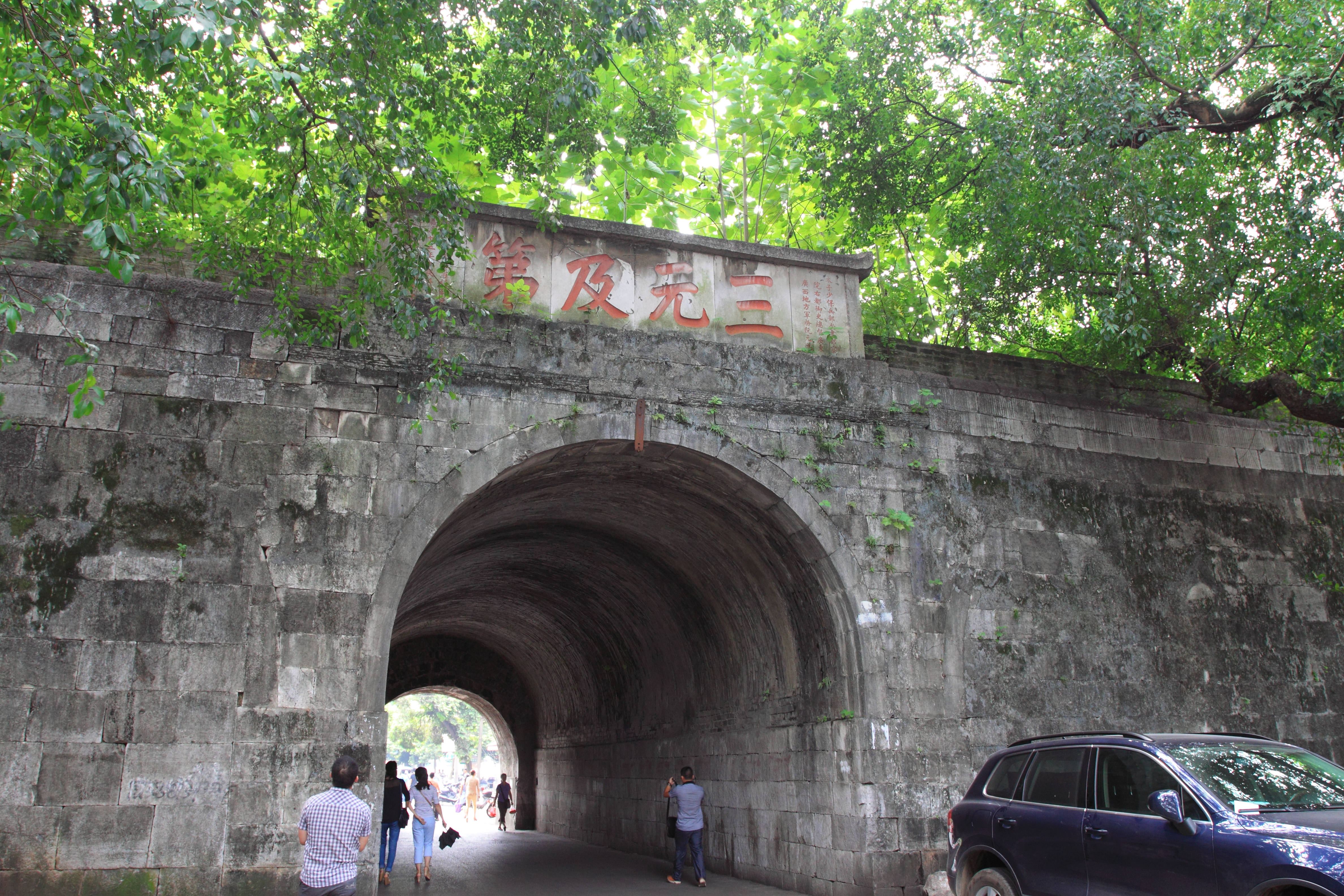 靖江王府南门（端礼门）北侧